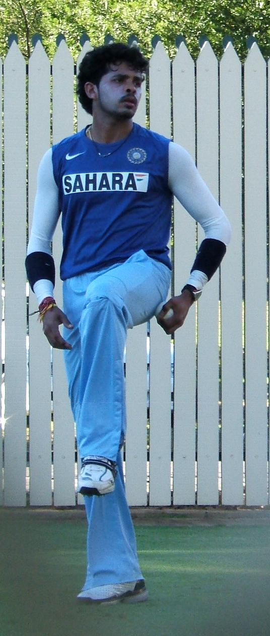 Sreesanth at Adelaide Oval